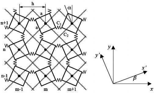 auxetic-rigit atomic clusters